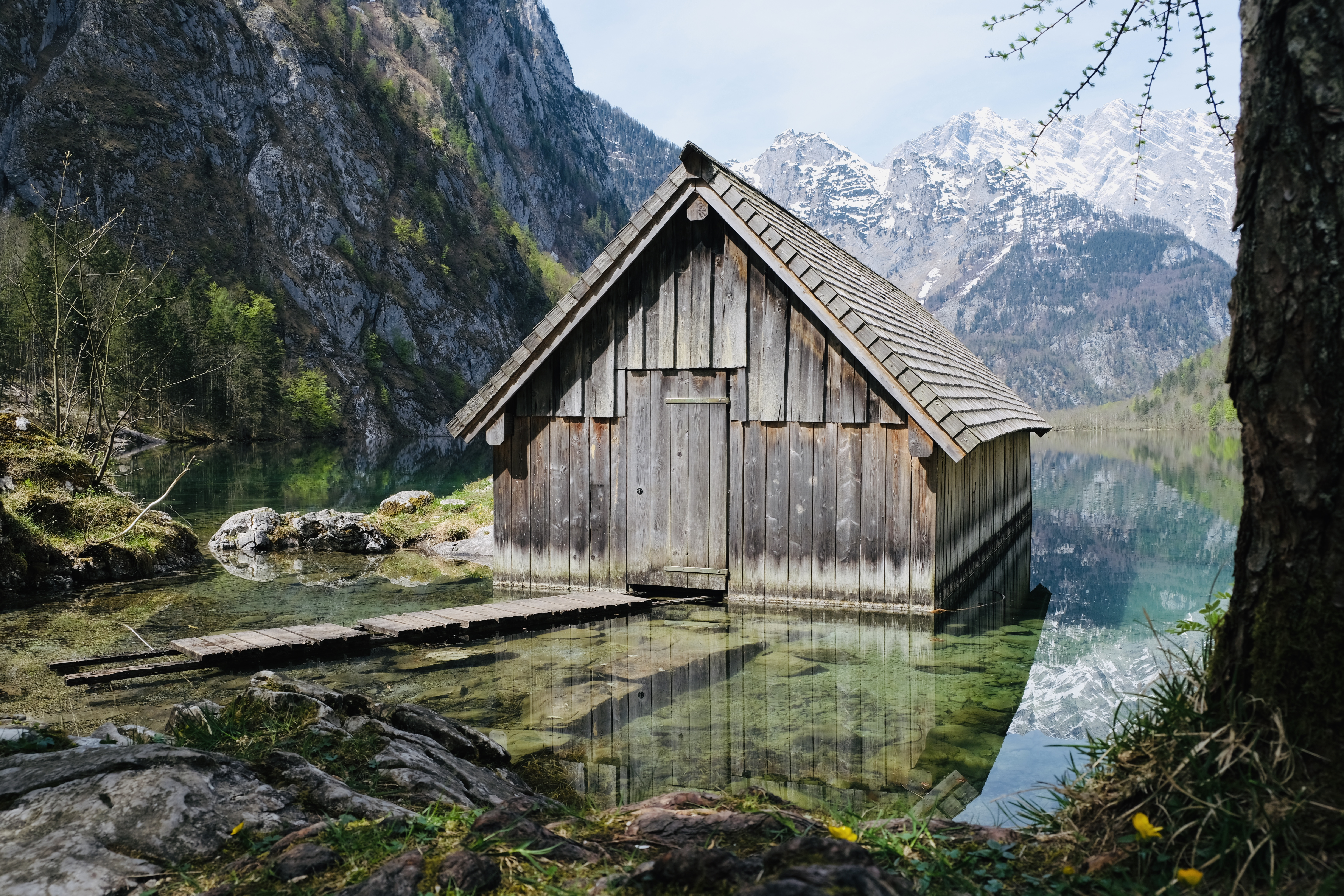 Das Bild zeigt eine Bootshütte am Obersee nahe der Fischunkelalm im Nationalpark Berchtesgaden.